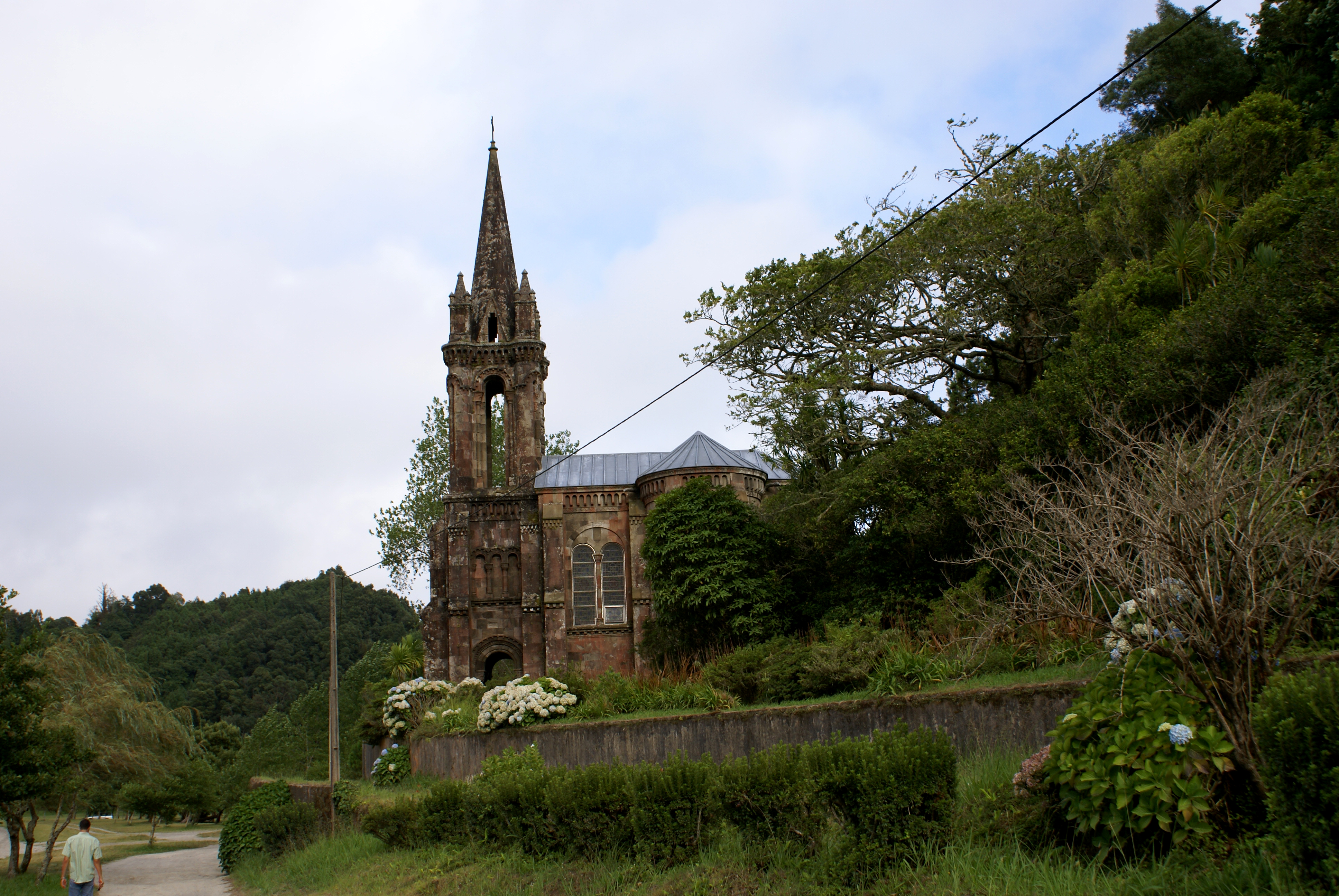 Capela de Nossa Senhora das Vitórias, (Ermida de José do Canto), vista geral, Lagoa das Furnas, ilha de São Miguel, Açores